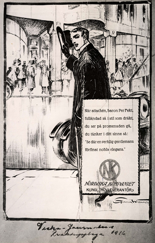 Reklambild från 1915 från Nordiska Kompaniet. En elegant klädd man står bredvid en bil utanför NK, han lyfter på hatten. Framför varuhusets entré står dörrvaktmästare, och besökare i tidstypisk dräkt. Reklambilden är tydligt riktad mot en manlig konsument, och NK visas här upp som ett varuhus som också välkomnar män. Under det sena 1800-talet och en bit in på 1900-talet var ofta kvinnor i centrum för den reklam som olika varuhus producerade: varuhuskonsumenten antogs ofta var kvinna och varuhuset antogs vara en "kvinnlig" sfär som mycket styrdes av kvinnor och kvinnors begär. När till exempel Selfridges öppnade i London 1909, framhölls det som ett kvinnors konsumtionsparadis - med varuhuset som ett slags gåva till den enväldiga kvinnliga konsumenten - i den serie reklambilder som producerades.